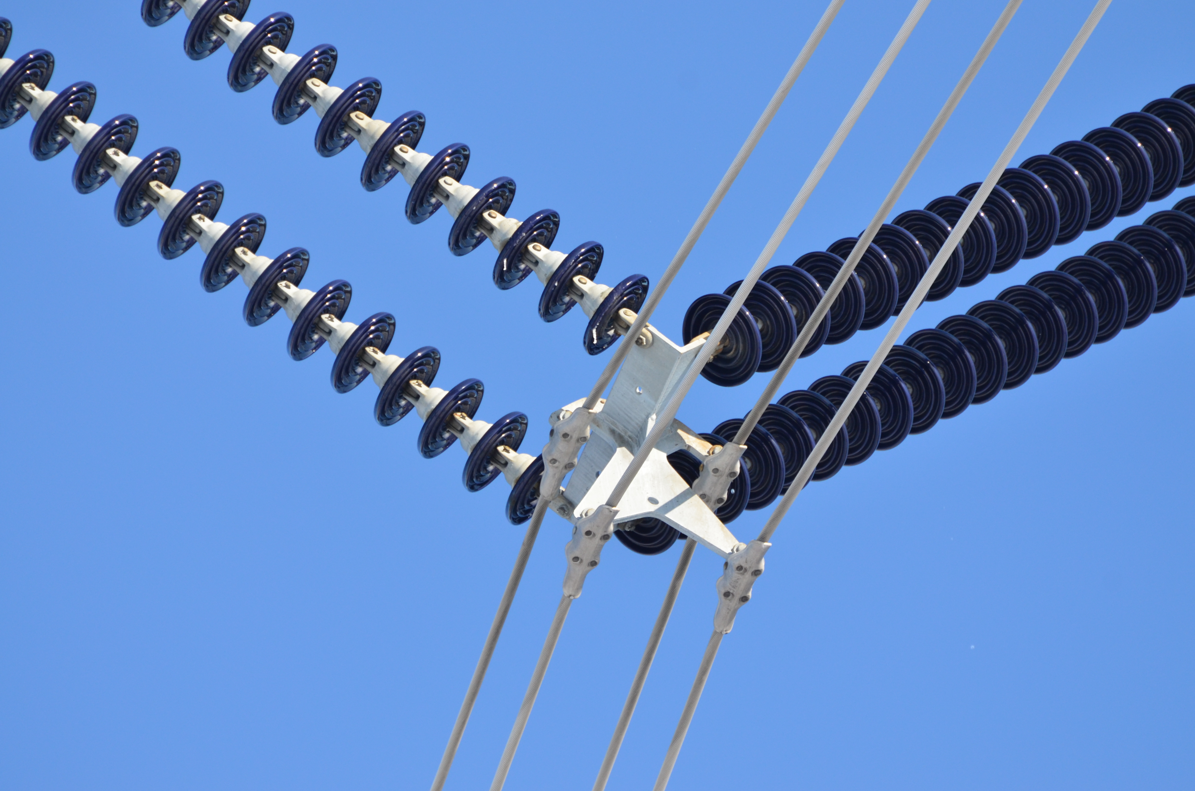 Détail de la structure d'un pylône électrique québecois.